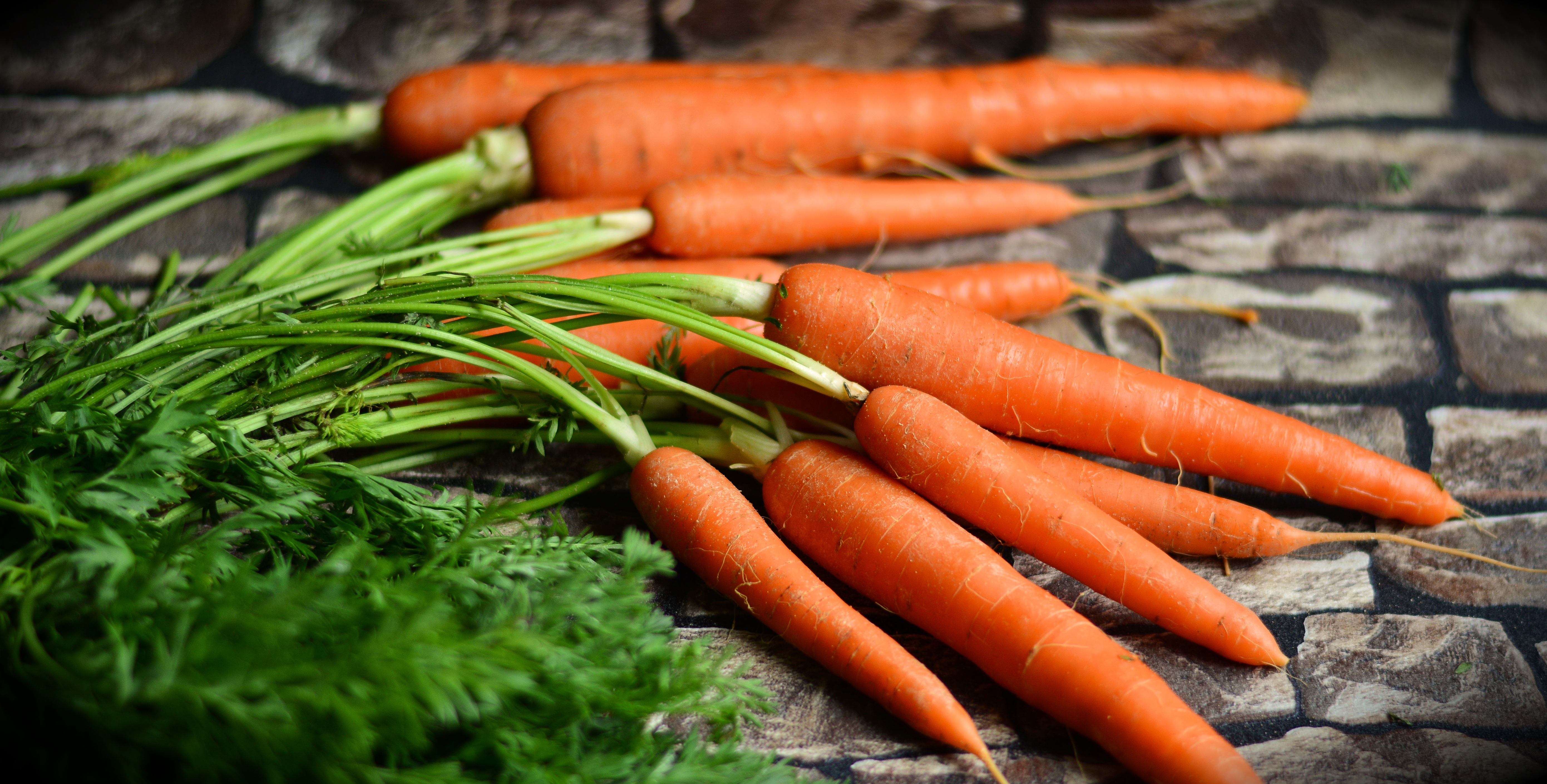 Carottes frais